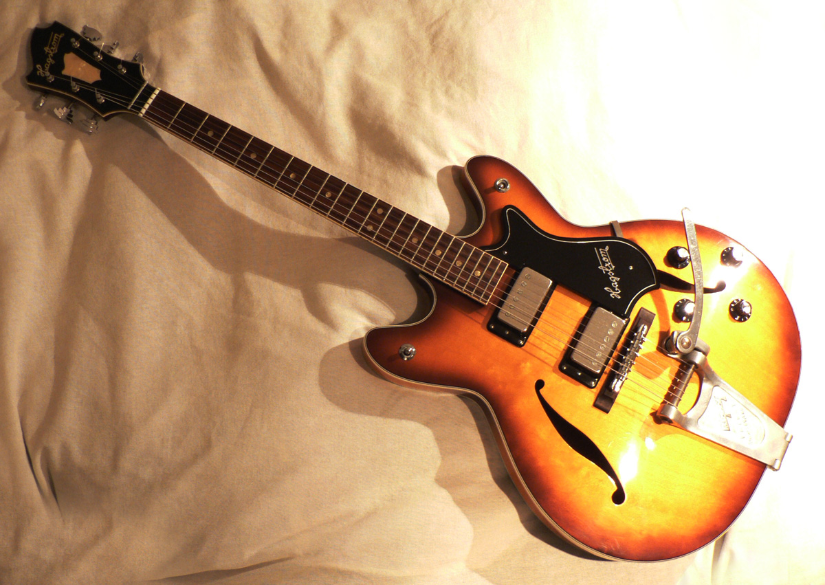 Hagström Viking IN, 1970er Jahre